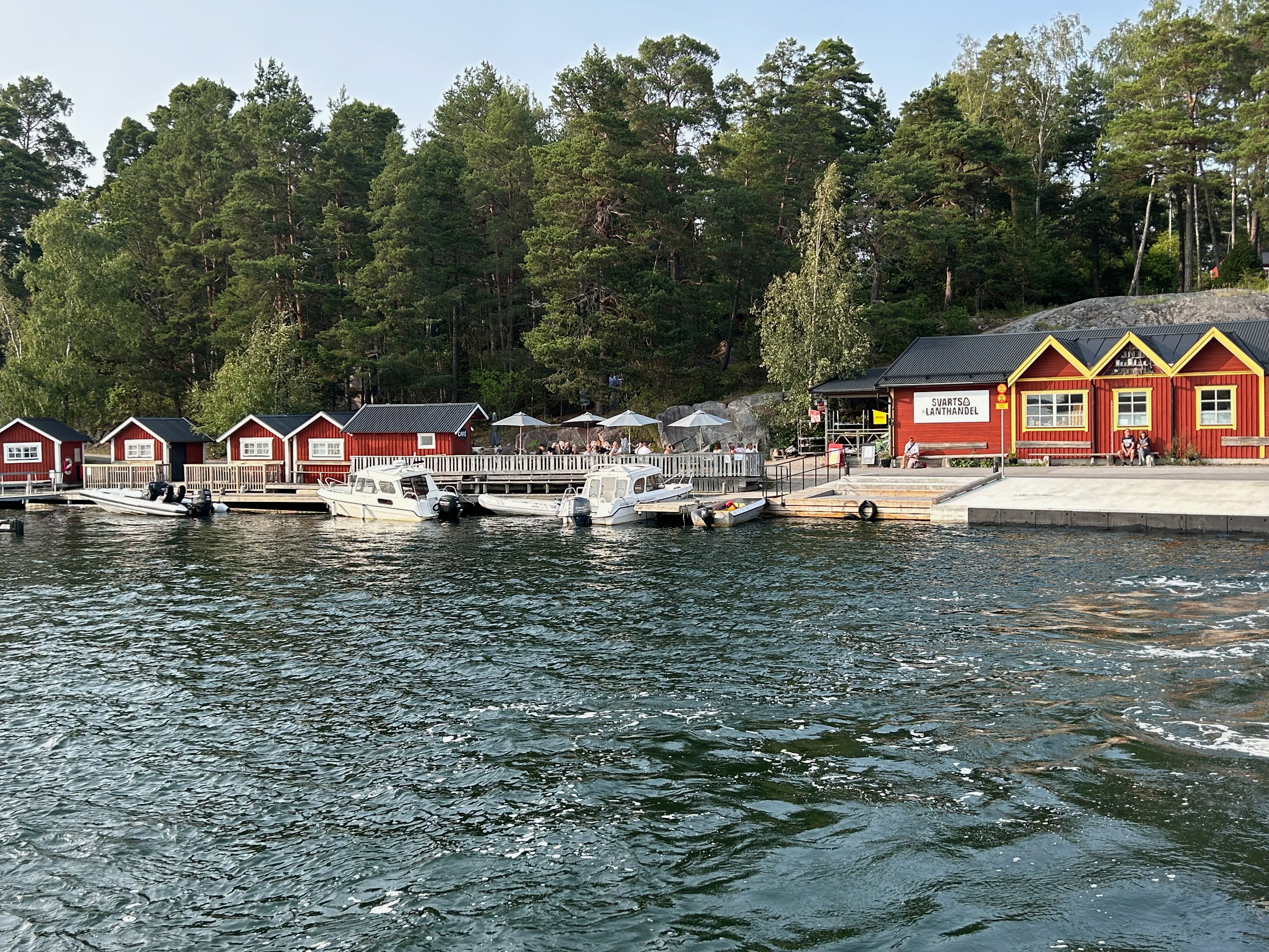 Svartsö vid Alsvik med ångbåtsbrygga och affärer.